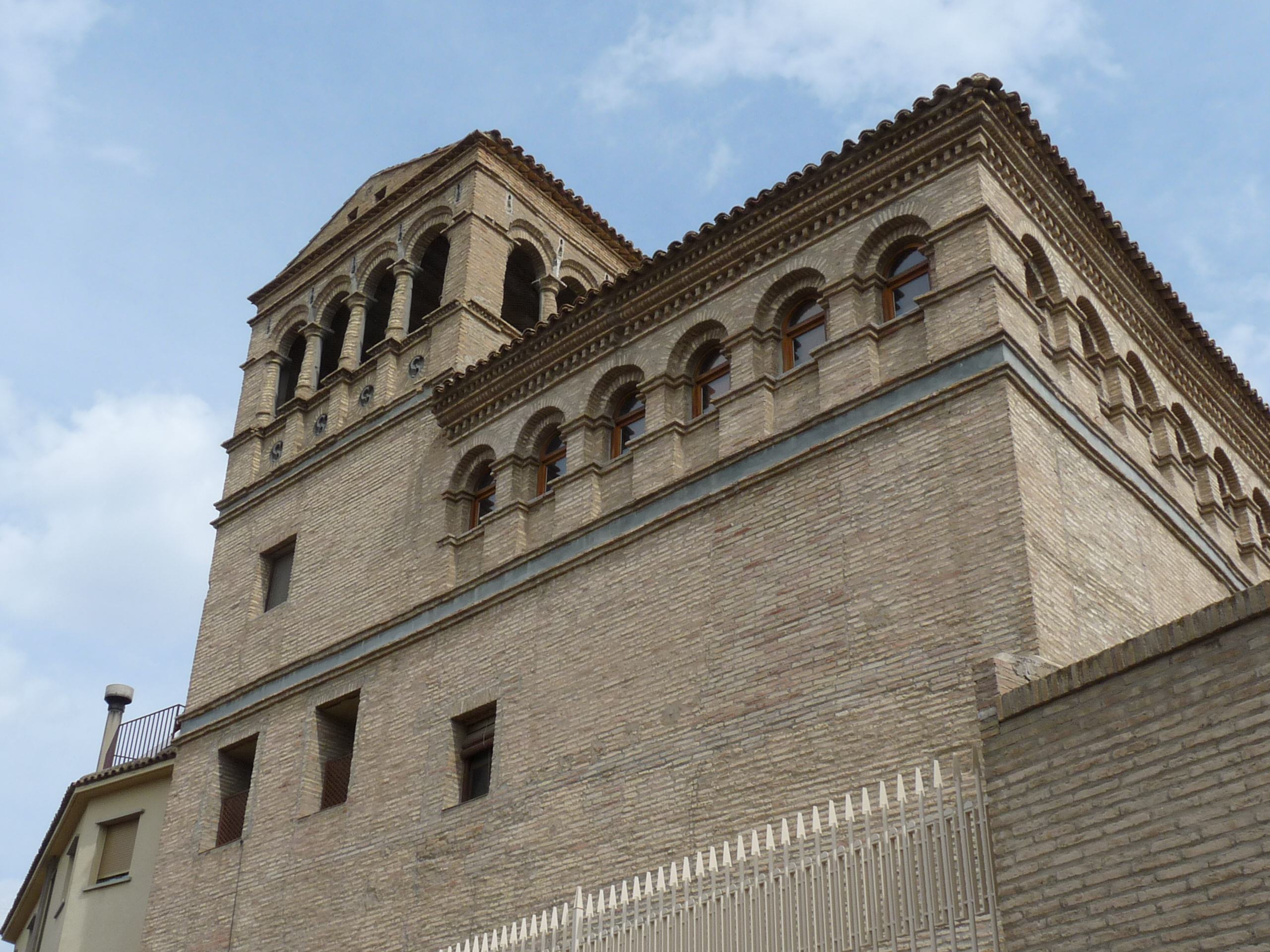 Tauste - Monasterio de San Jorge (s. XVII)